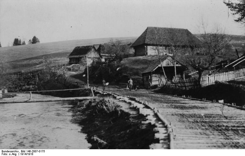 Knüppeldamm